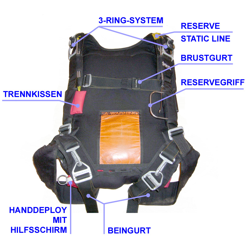 Skydive rig parts de